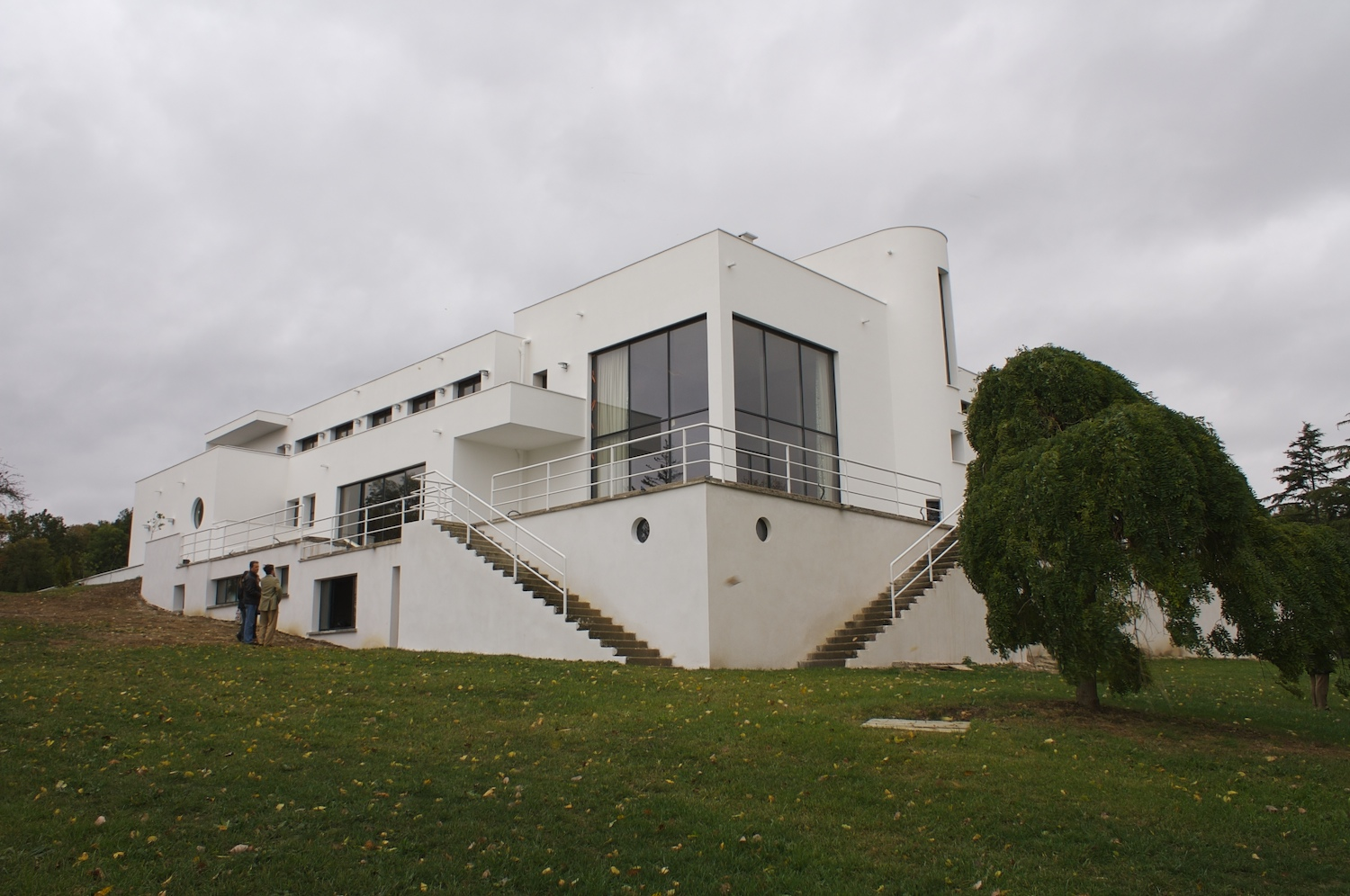 Mézy-sur-Seine, France, Rob Mallet Stevens, villa Poiret 1924 (modified in 1932)